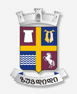 ზუგდიდის მუნიციპალიტეტის გერბი